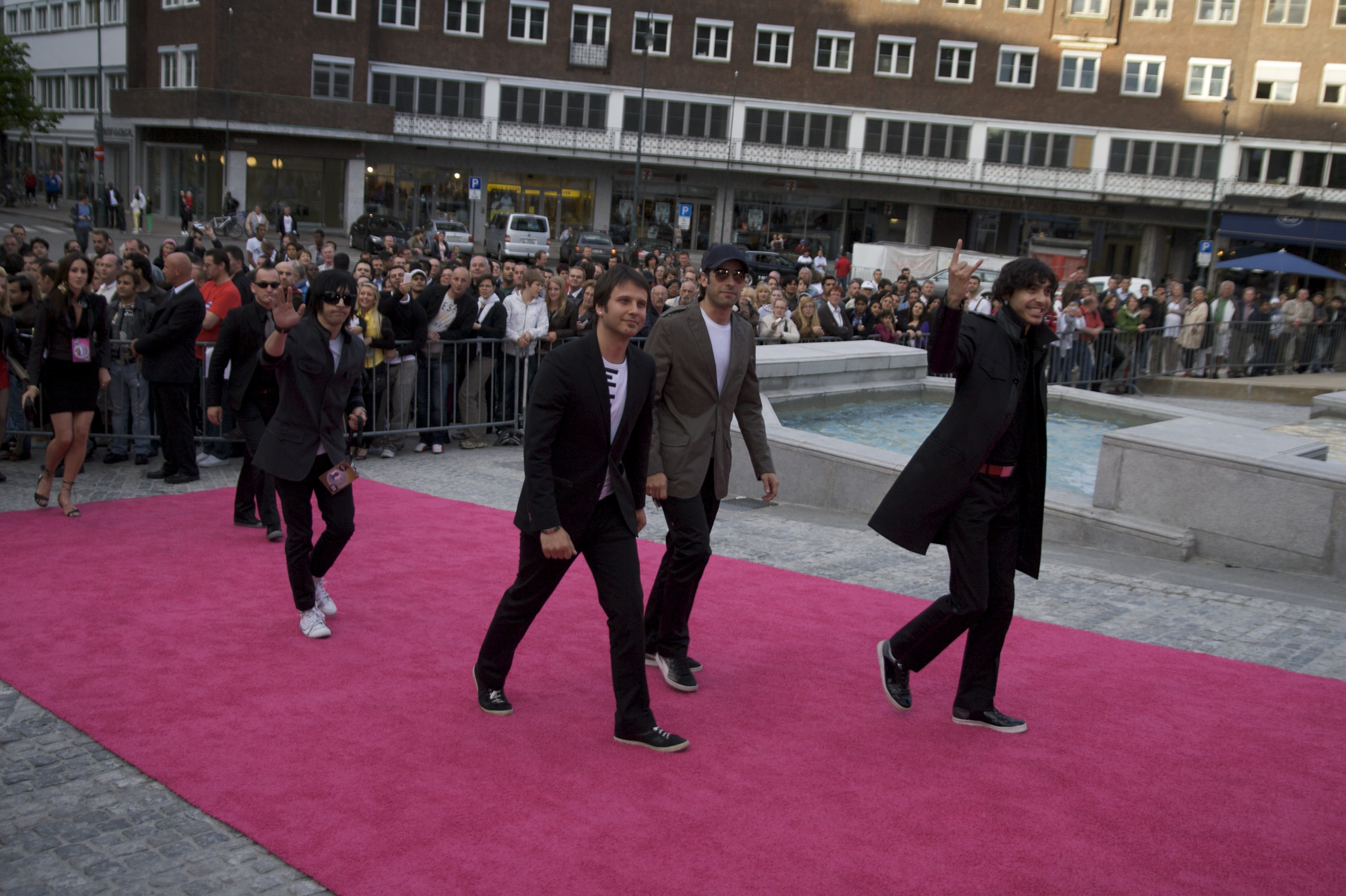 Foto: Vincent Hasselgård, Aktiv I Oslo.no